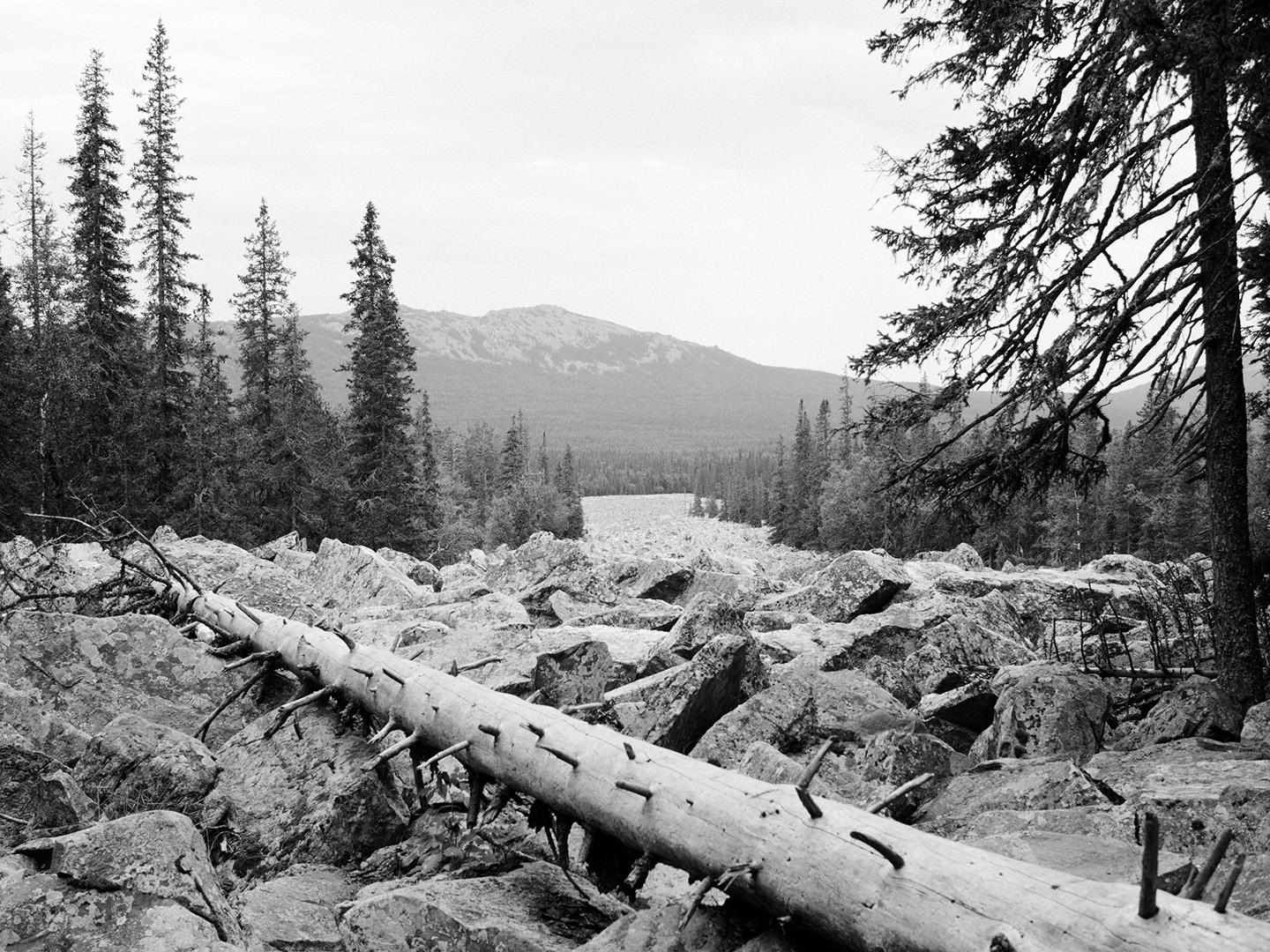 Глыбовая россыпь в природном парке "Иремель".